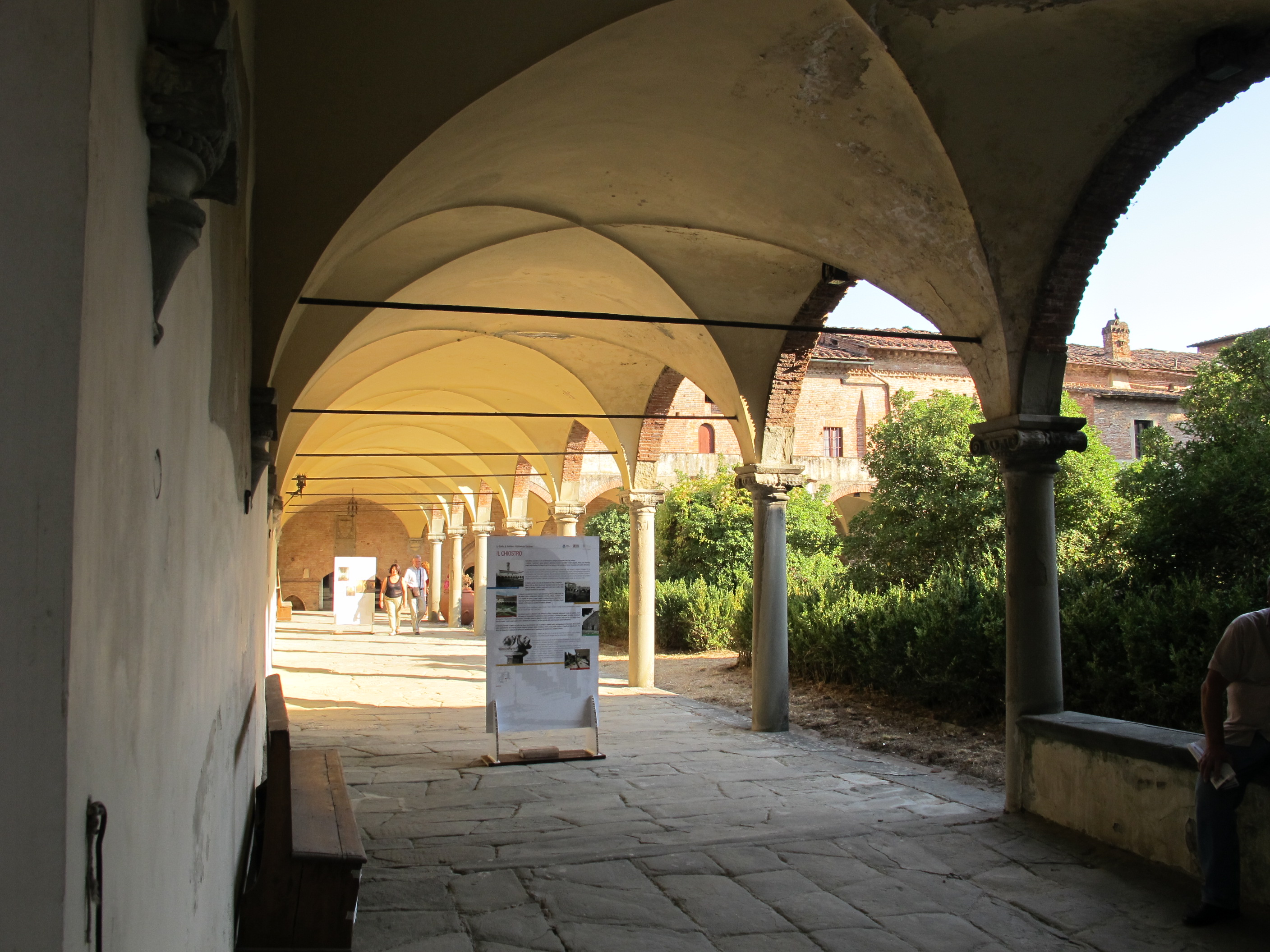 Badia a settimo, chiostro grande